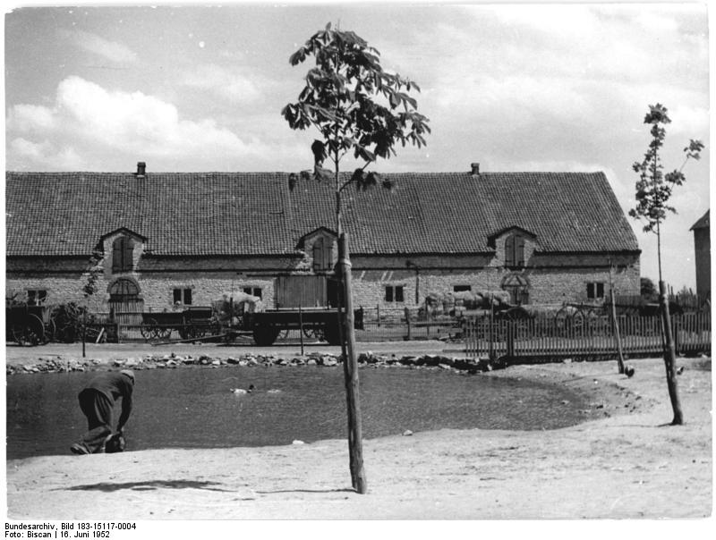 Wanzleben-Buch, Dorfteich ZB-Biscan-16.6.1952 Neubauansiedlung mit Windschutz - Windschutzstreifen nach sowjetischen Vorbild gegen die Versteppung der Magdeburger Börde. Zur Verbesserung der Bodenkultur, wie sie der Fünjahresplan vorsieht, werden in der DDR nach sowjetischen Vorbild lange Winschutzststreifen angelegt, besonders in den Ländern Sachsen-Anhalt und Brandenburg. Allein im Bördekreis Wanzleben, einem der Schwerpunkte der sich auf Jahre erstreckenden Aktion, wurden in der letzten Pflanzzeit rund 600.000 Wildgehölze und 10.000 Obstbäume gesetzt. In der Neubauernsiedlung Wanzleben-Buch wurde ein Schulbeispiel geschaffen, indem jedes Gehöft und die ganze Siedlung mit Windschutzhecken gesichert wurde. In wenigen Jahren wird sich an diesen Beispiel zeigen, wie die Erträge durch zweckmässigen Windschutz gesteigert werken können. UBz: Der Dorfteich auf dem Hof des ehemaligen Vorwerks ist ebenfalls bepflanzt worden. Heute bietet er noch einen trostlosen Anblick, in wenigen Jahren wird es hier grünen, Mensch und Tier werden ein schattiges Plätzchen finden.